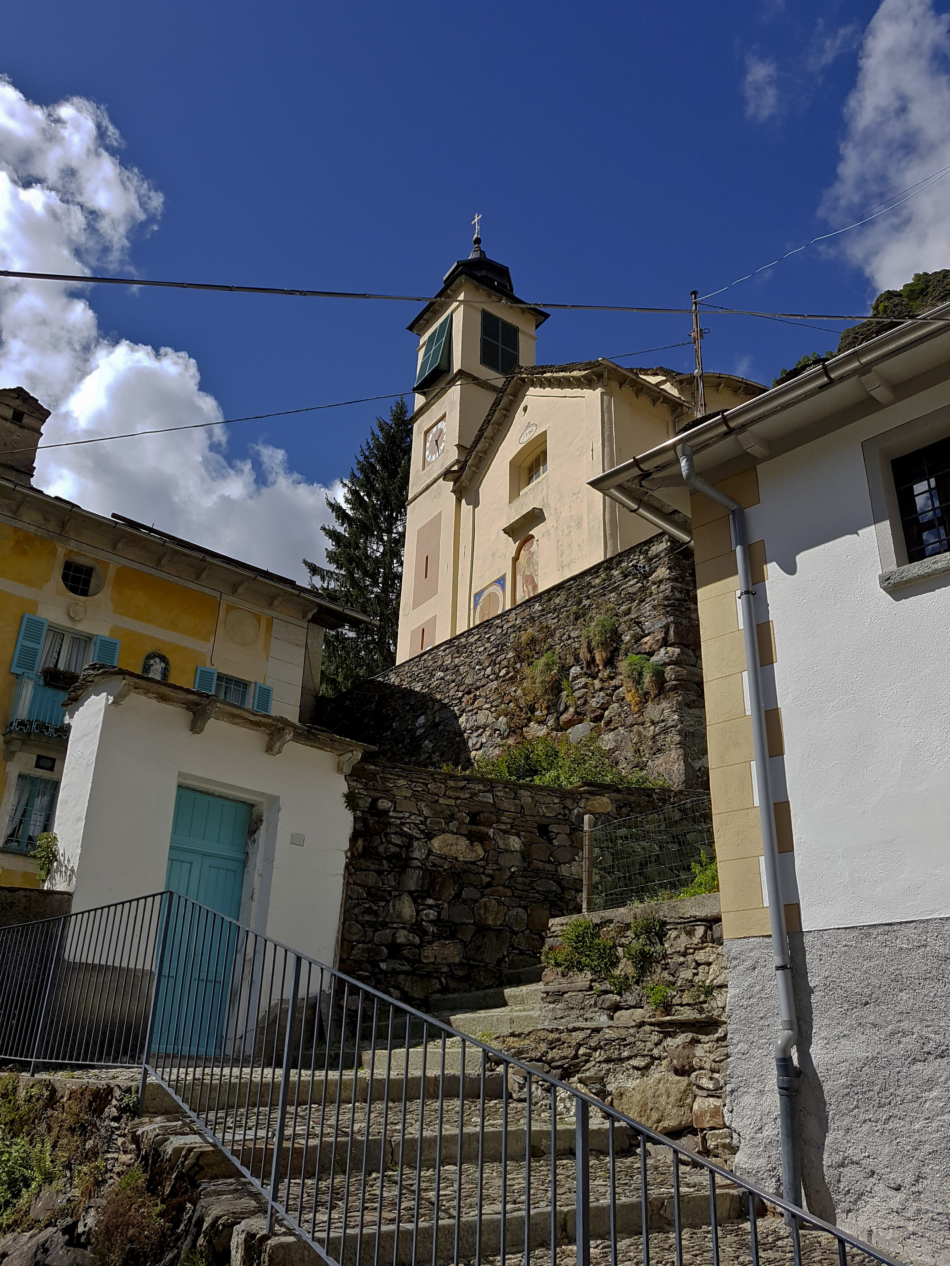 Facciata della chiesa di San Giovanni Battista ripresa da via La Gassa di fianco alla ex scuole elementare